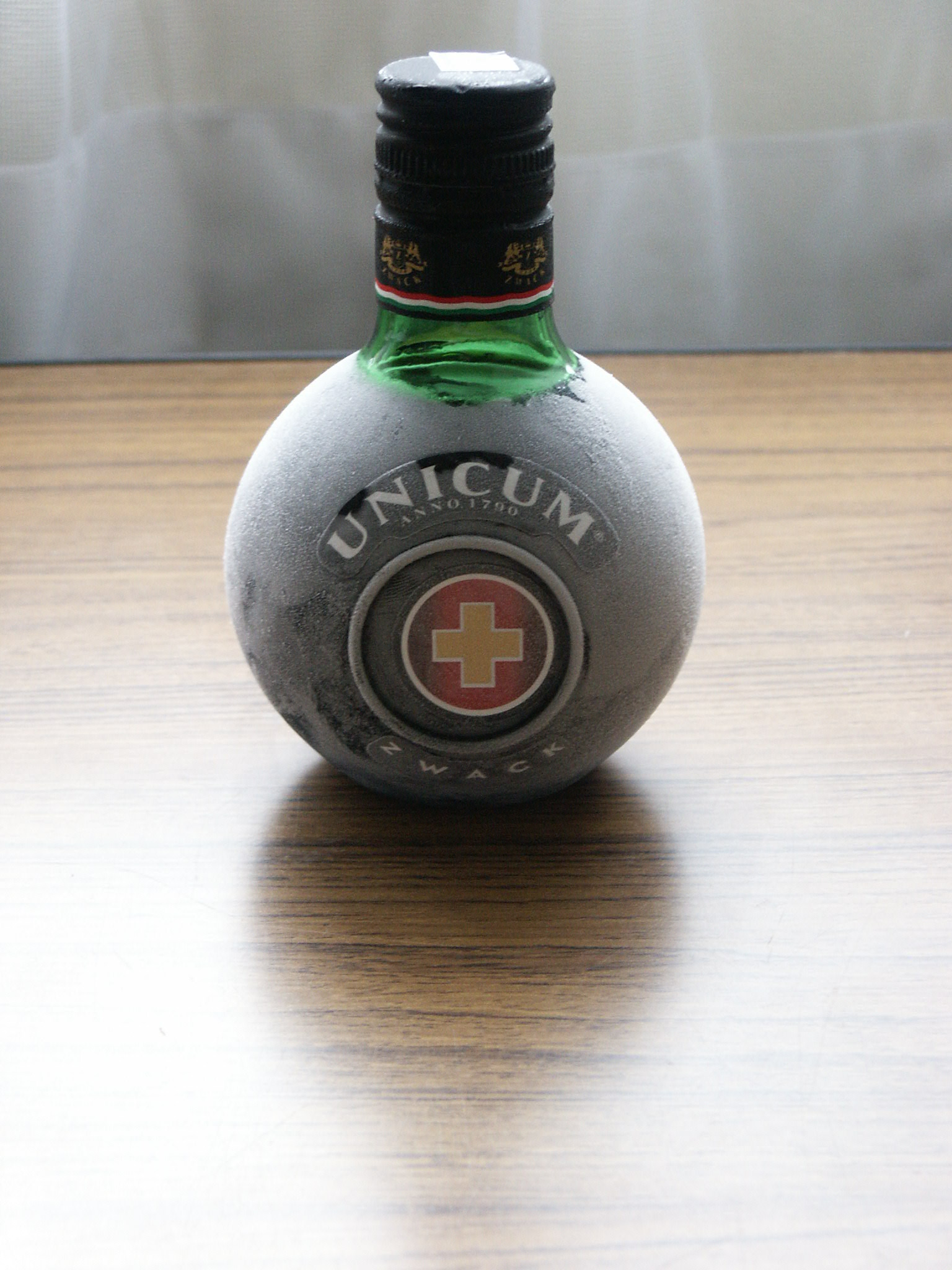 Unicum liquer 0,2 litre bottle